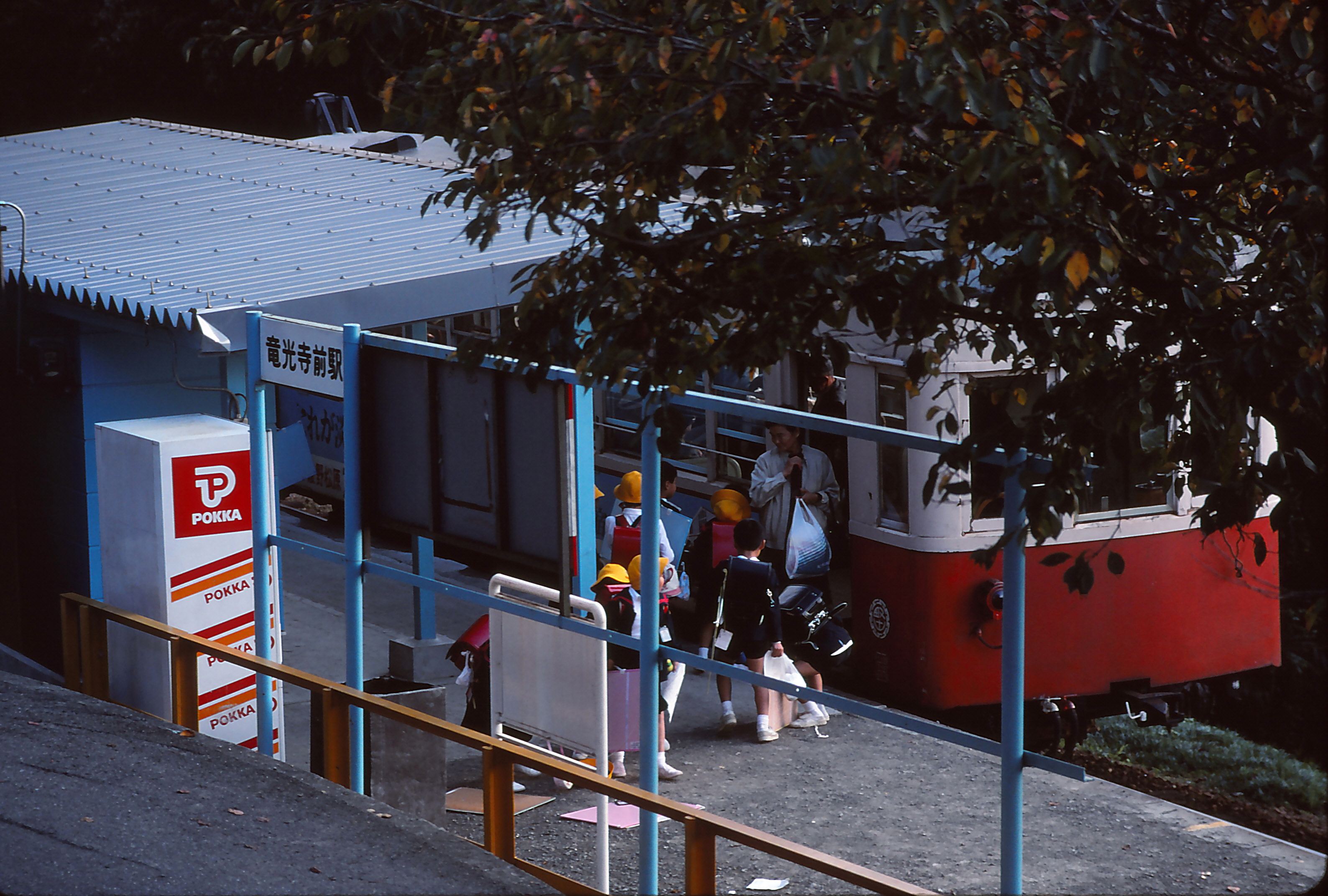 野上鉄道 竜光寺前駅